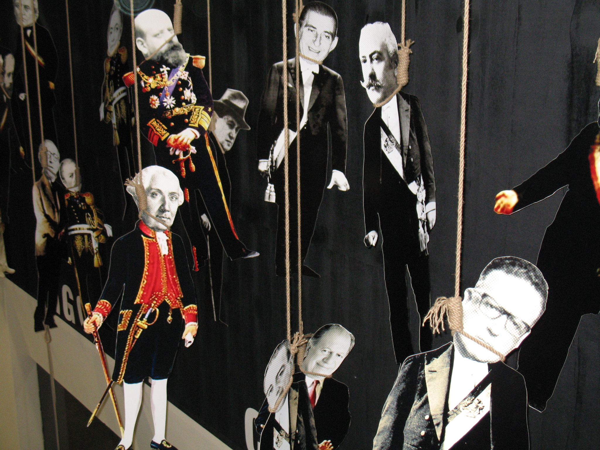 "El pago de Chile", instalación de Nicanor Parra.